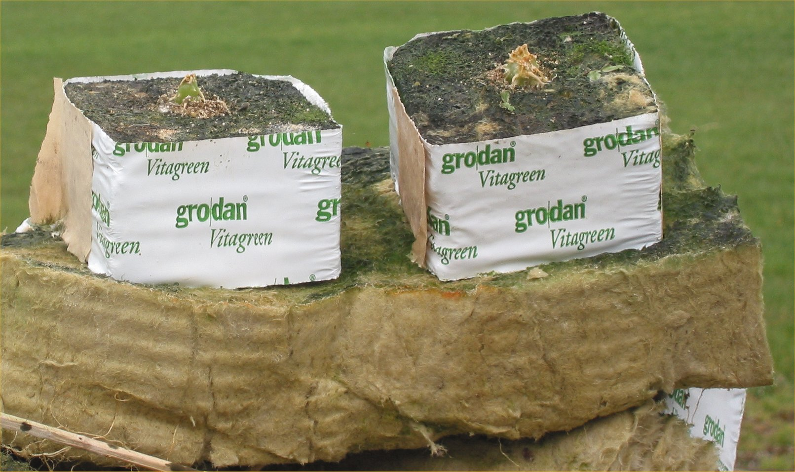 (Steenwolpotjes op een steenwolmat) Mineral wool pots